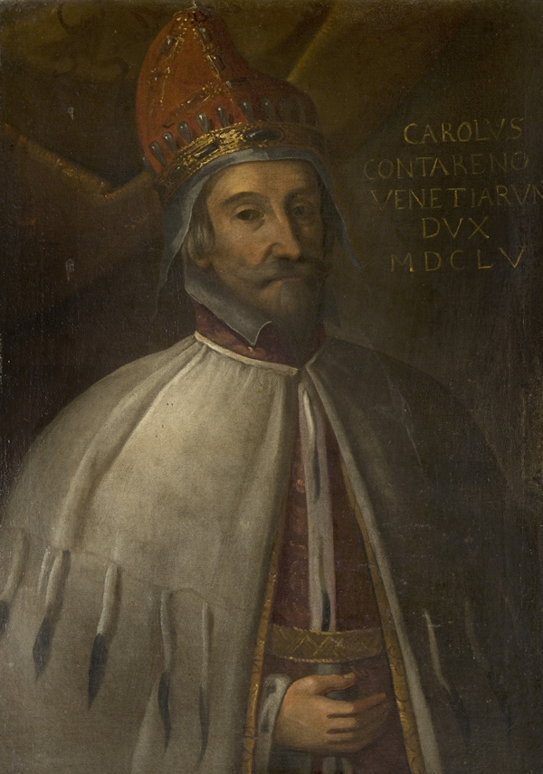 Портрет дожа Венеции Карло Контарини (1655-1656)